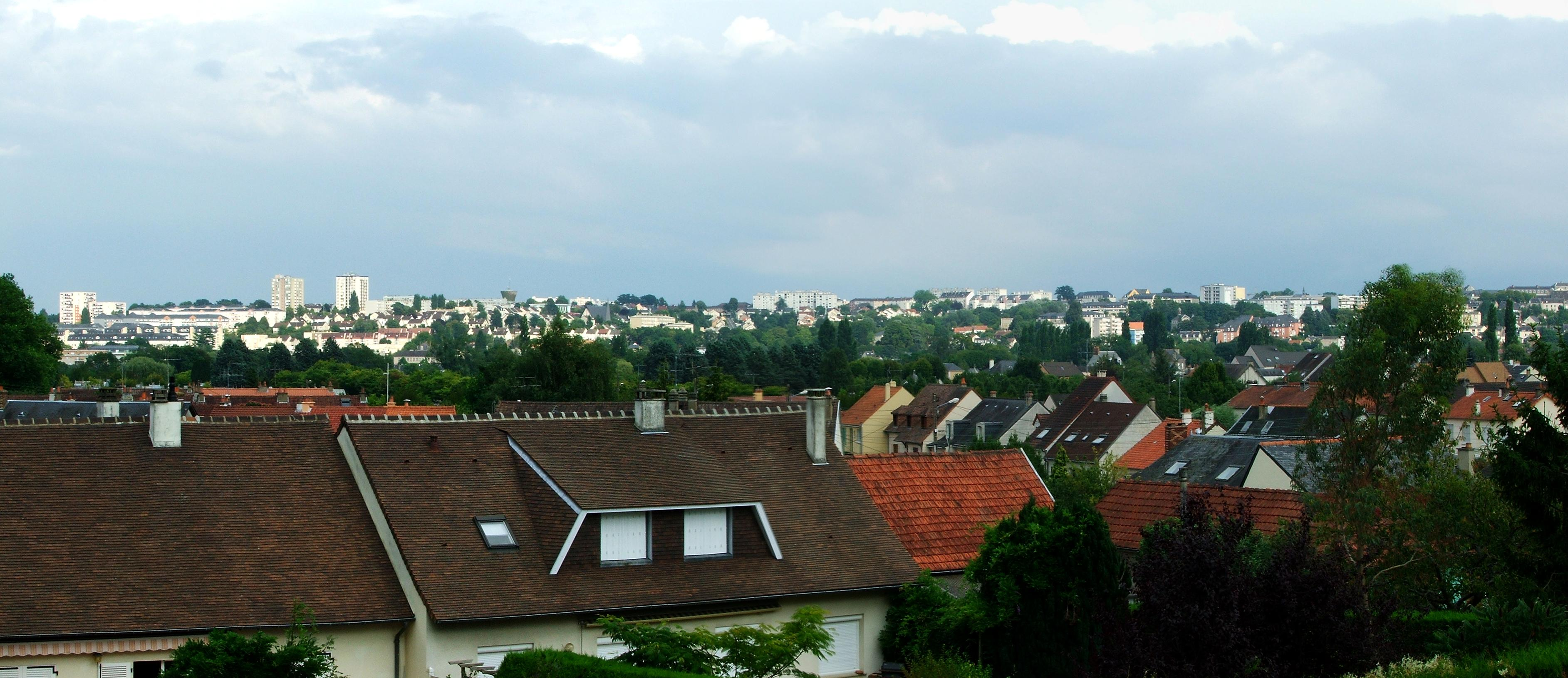 Panorama du quartier de Bellevue depuis Beauregard.